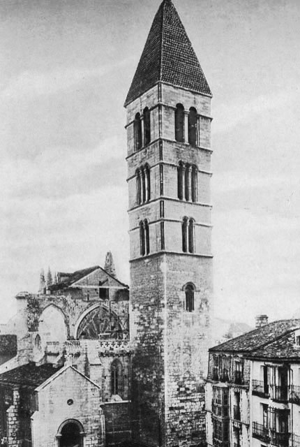 Iglesia de Santa María de La Antigua de Valladolid en la década de 1920. Se observan los trabajos de restauración y reconstrucción del edificio